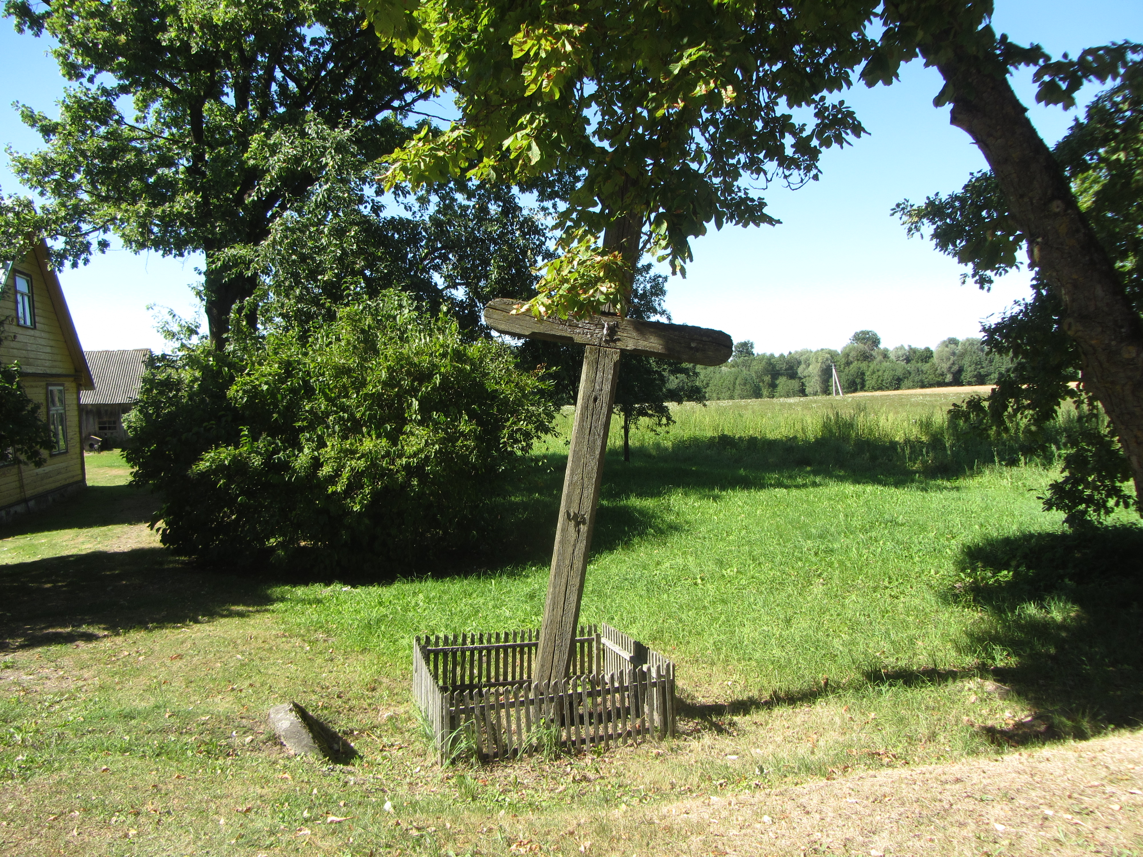 Vėžionys, Lithuania